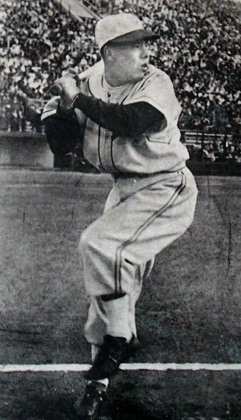 選手時代の千葉茂